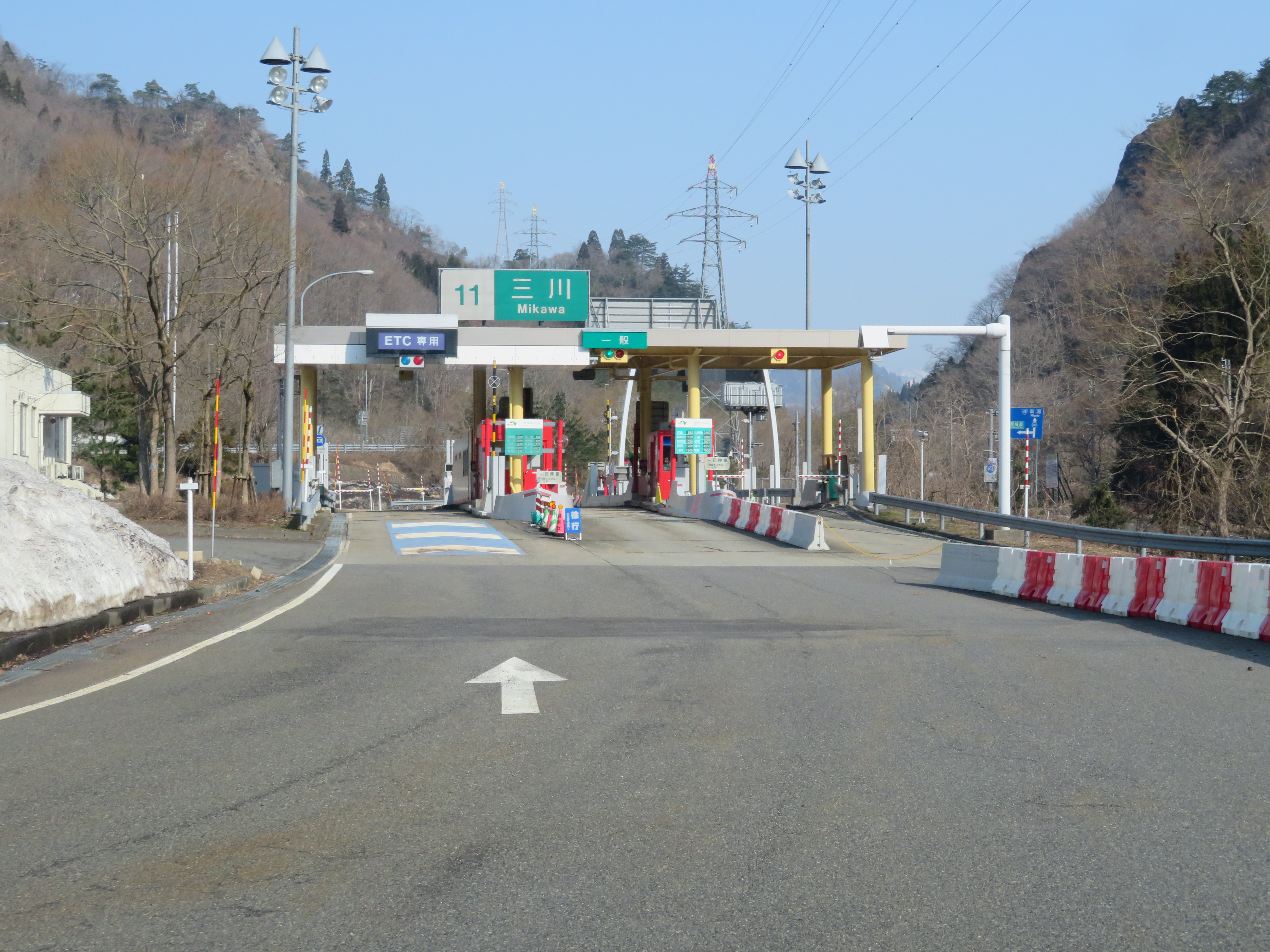 磐越自動車道三川ＩＣ料金所付近